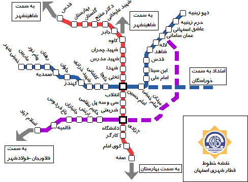 نقشه مترو اصفهان